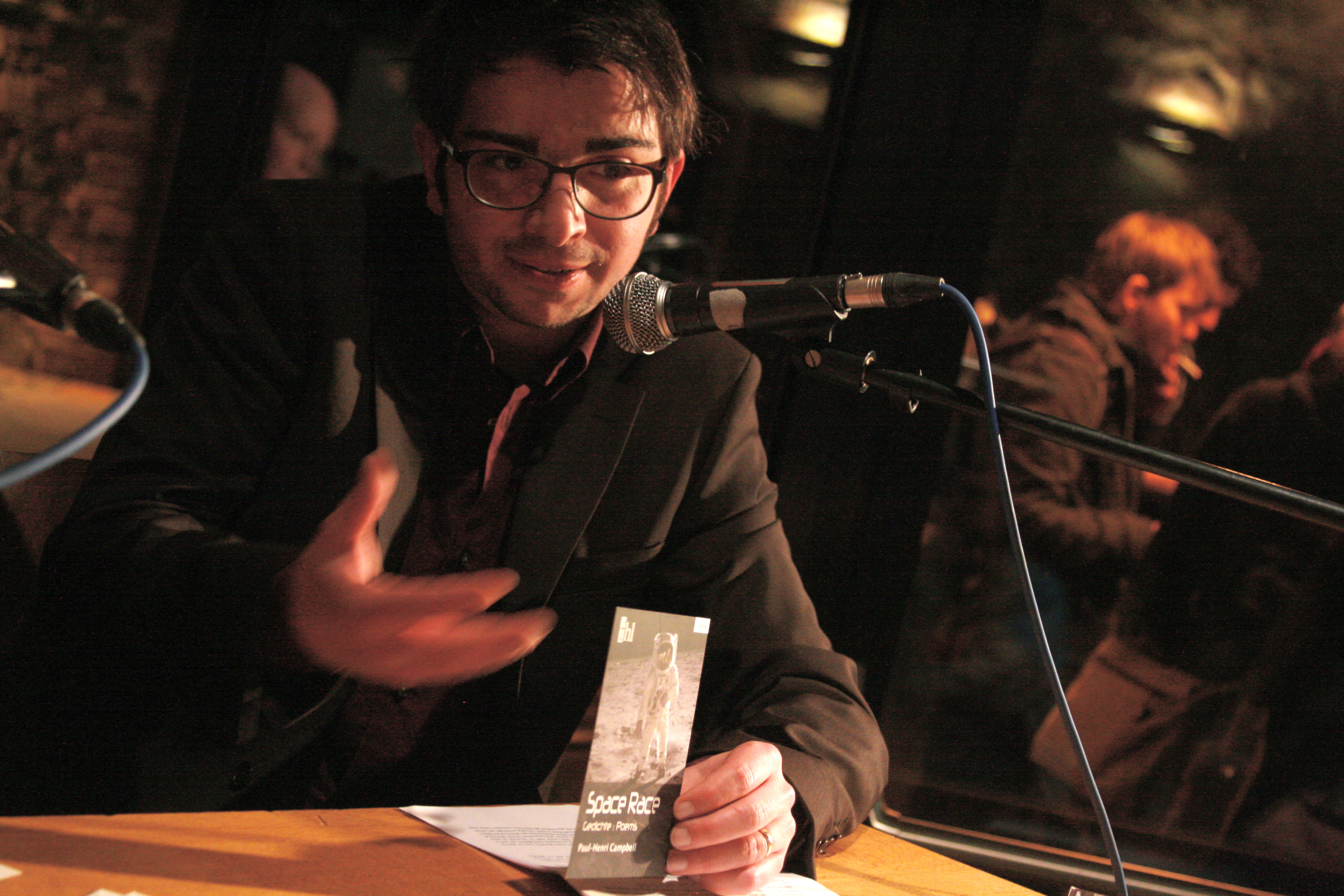 Schriftsteller Paul-Henri Campbell bei einer Lesung in Leipzig 2012